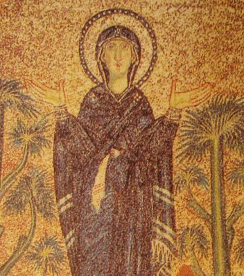 Богородица (деталь мозаики купола)